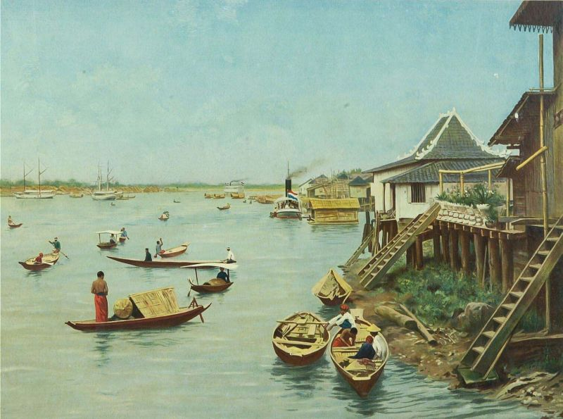 Schoolplaat. De rivier de Musi bij Palembang